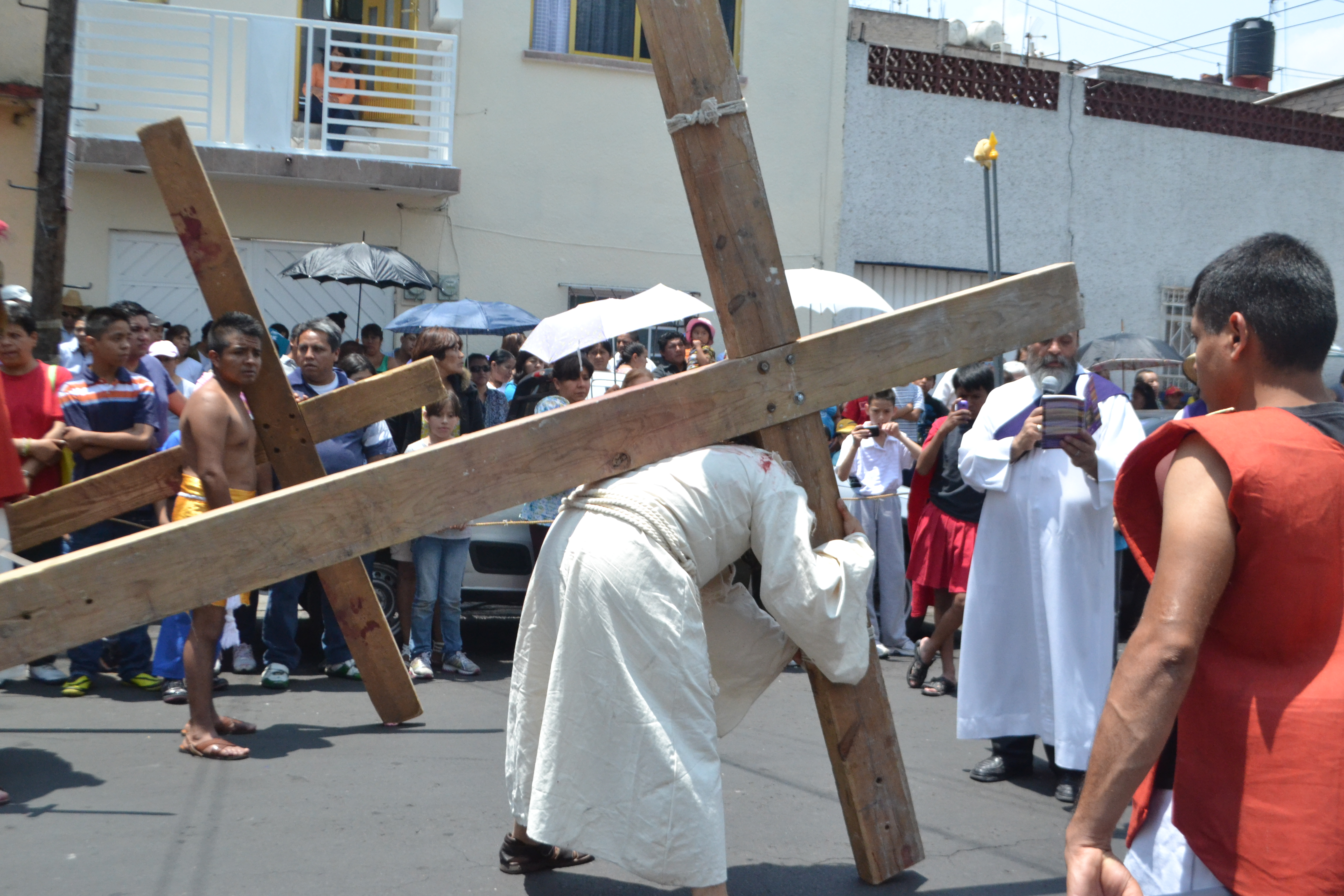 Viernes Santo 3 representación de crucifixión